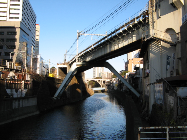 Kanda River bridge (Soubu line)